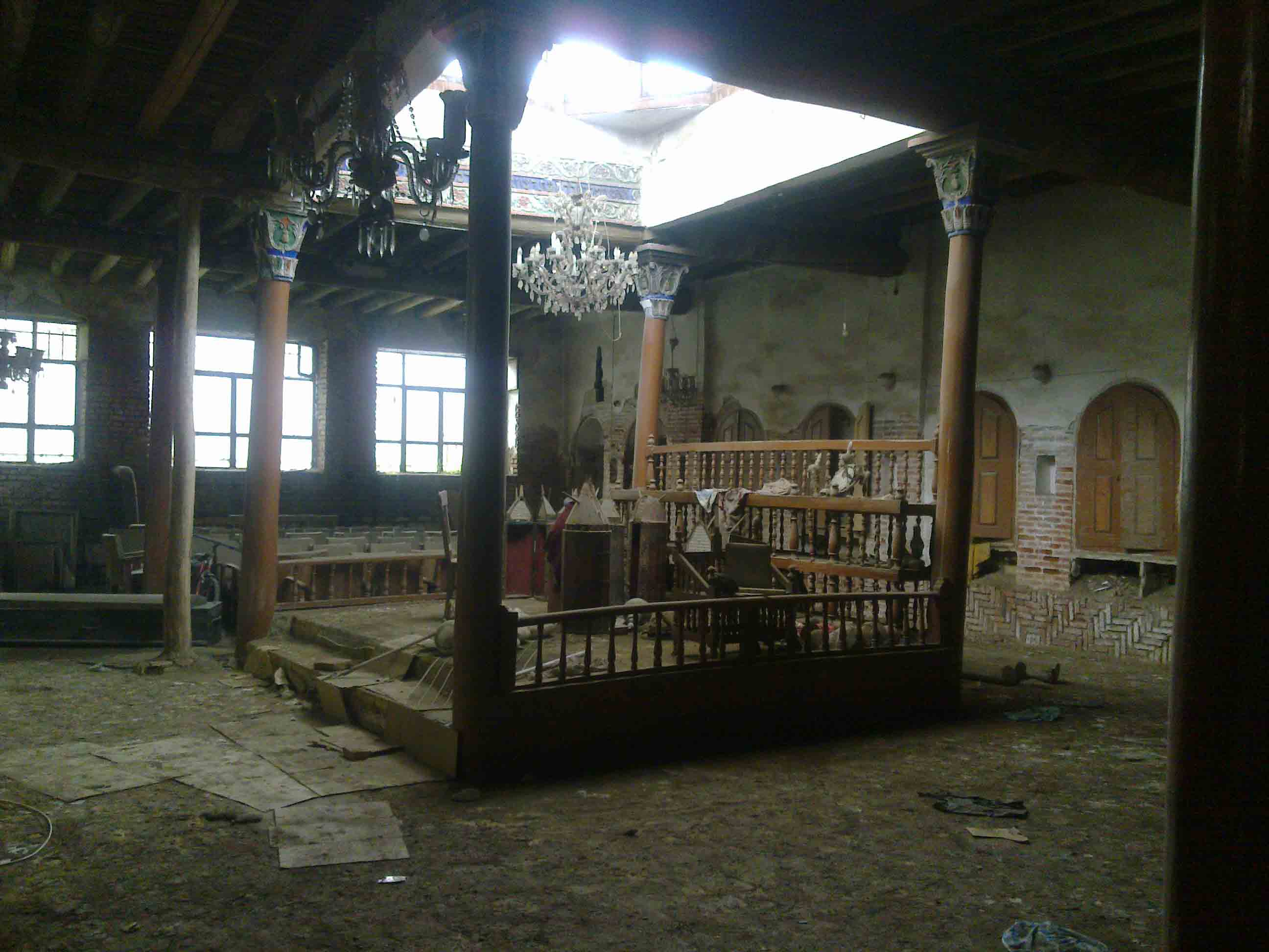 کنیسه کلیمیان